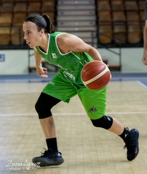 jugadora de baloncesto